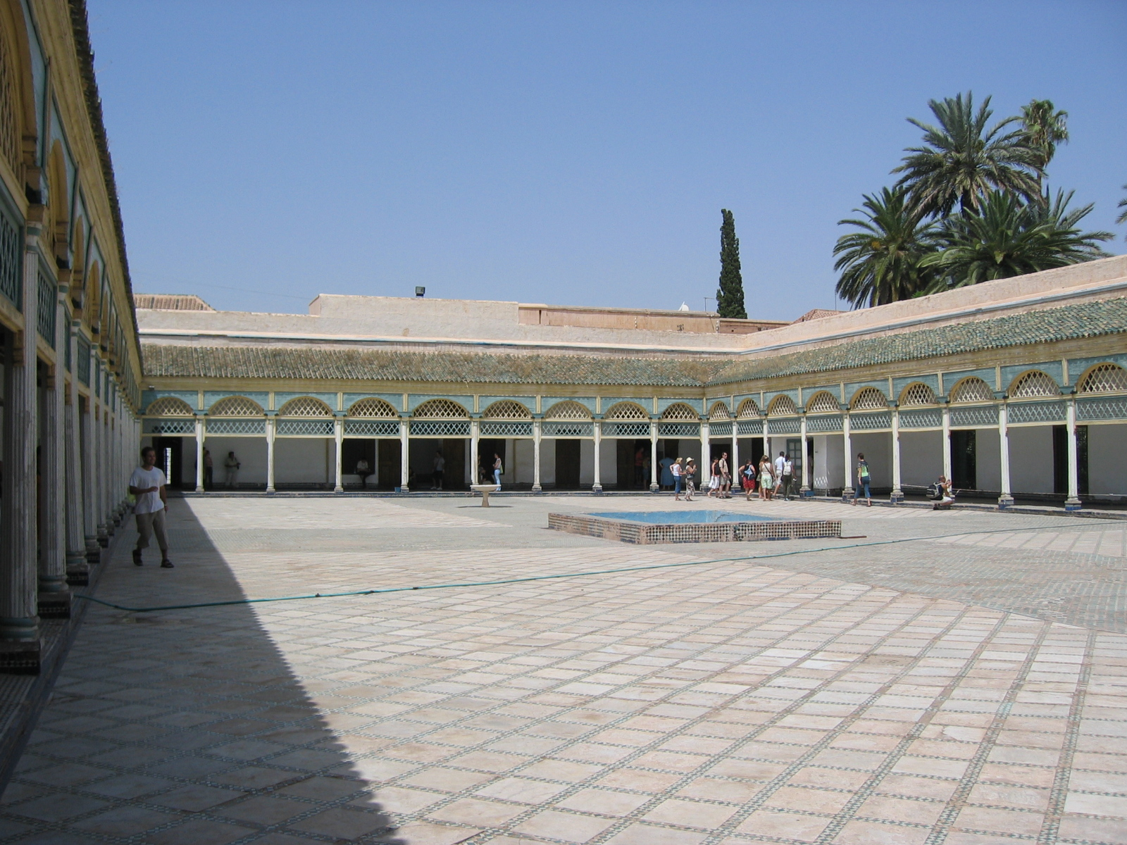 Bahia palace